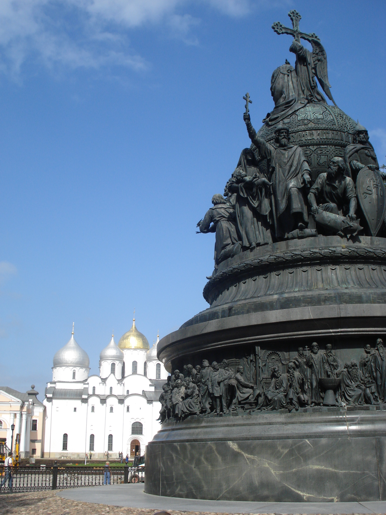 Велики Новгород. Софијски сабор и споменик 1000 година Русије. 5. август 2009. Снимио: Јакша П.